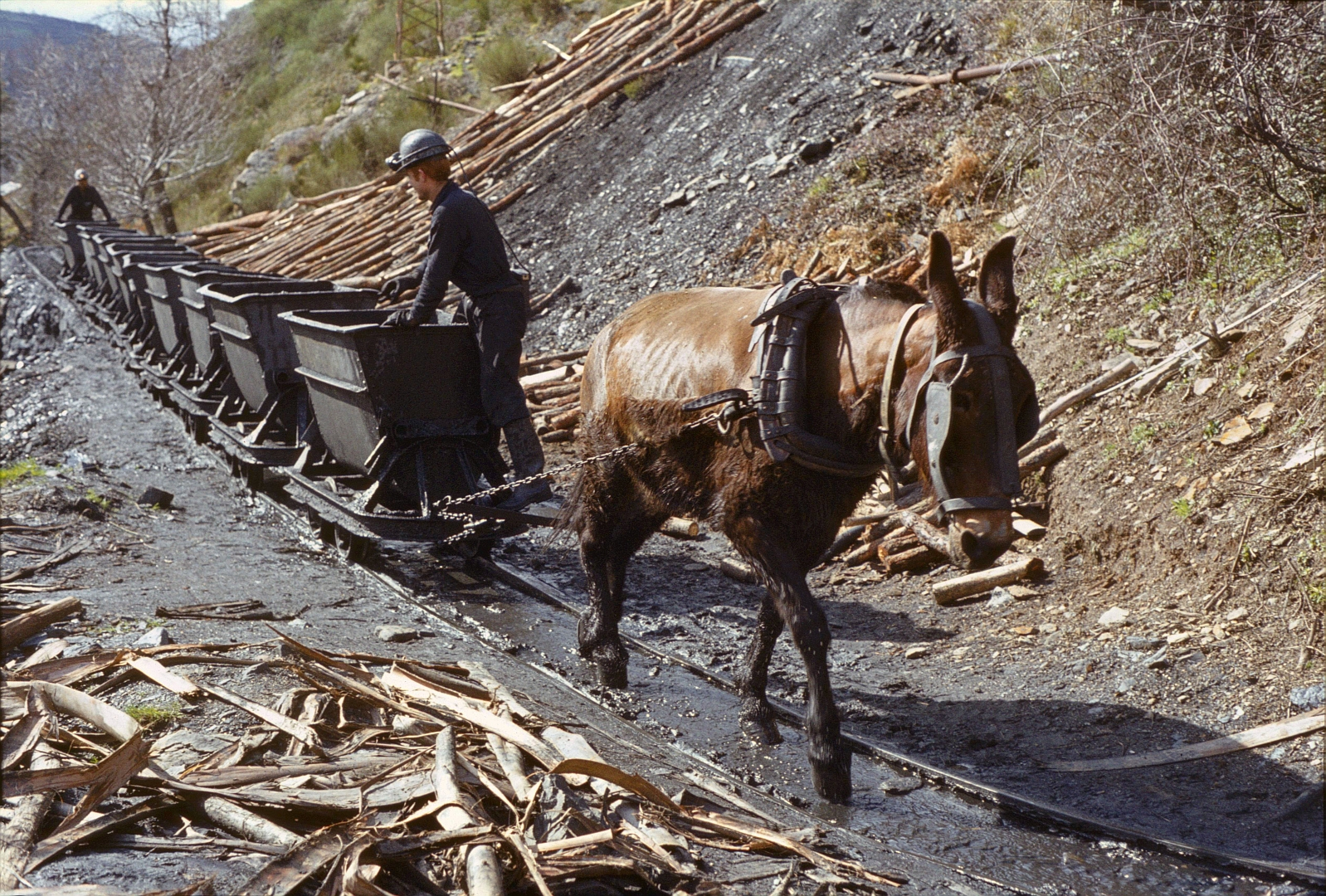 Traction animale pour un groupe de wagonnets d'une exploitation minière, vers Palacios del Sil en 1984.